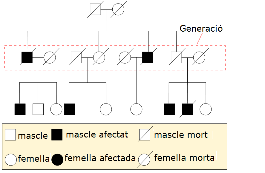 Exemple de diagrama de pedigrí.